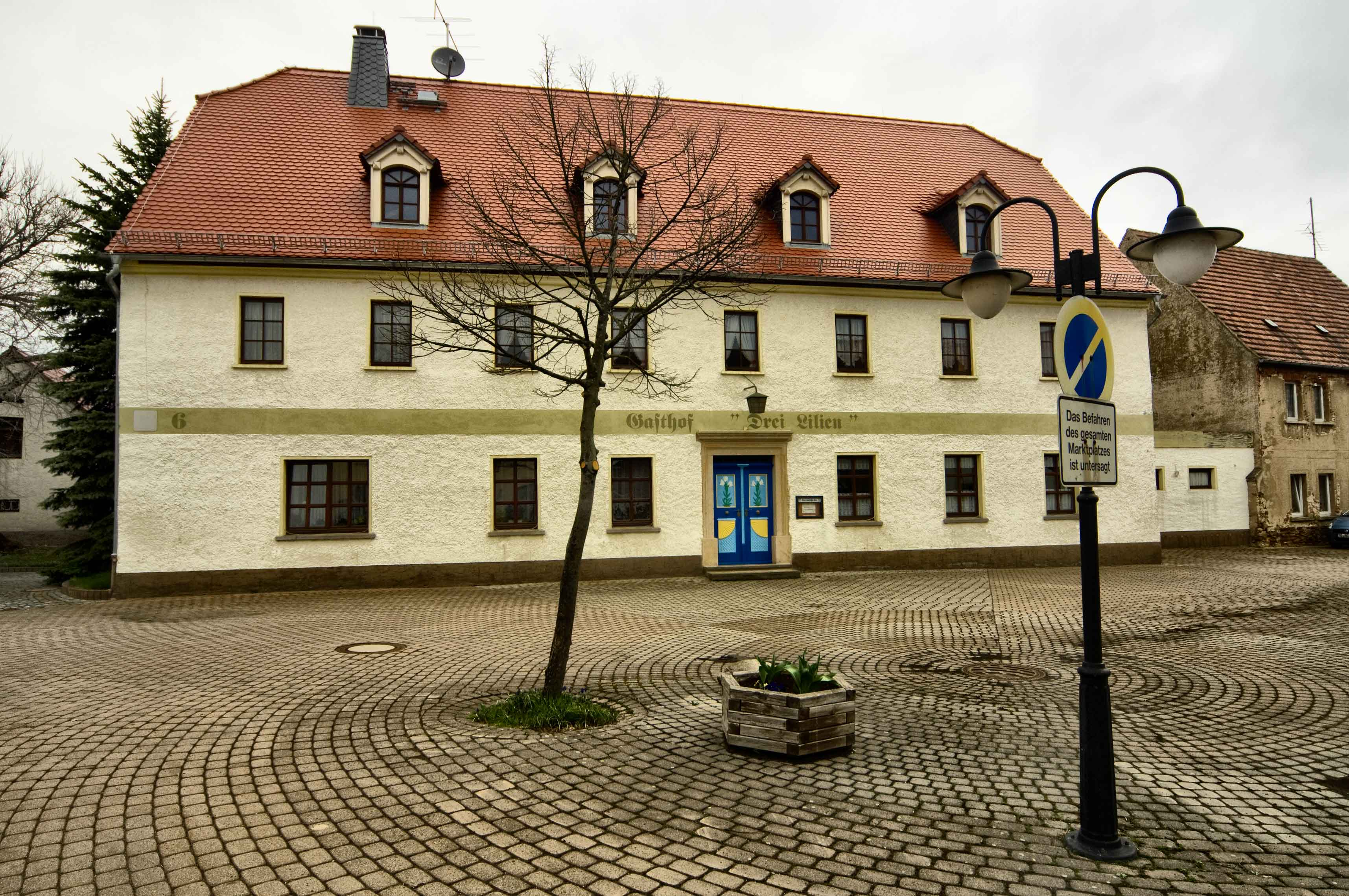 Die ehemalige Poststation in Calbitz, einem Ortsteil von Wermsdorf - heute Gasthaus Dreililien